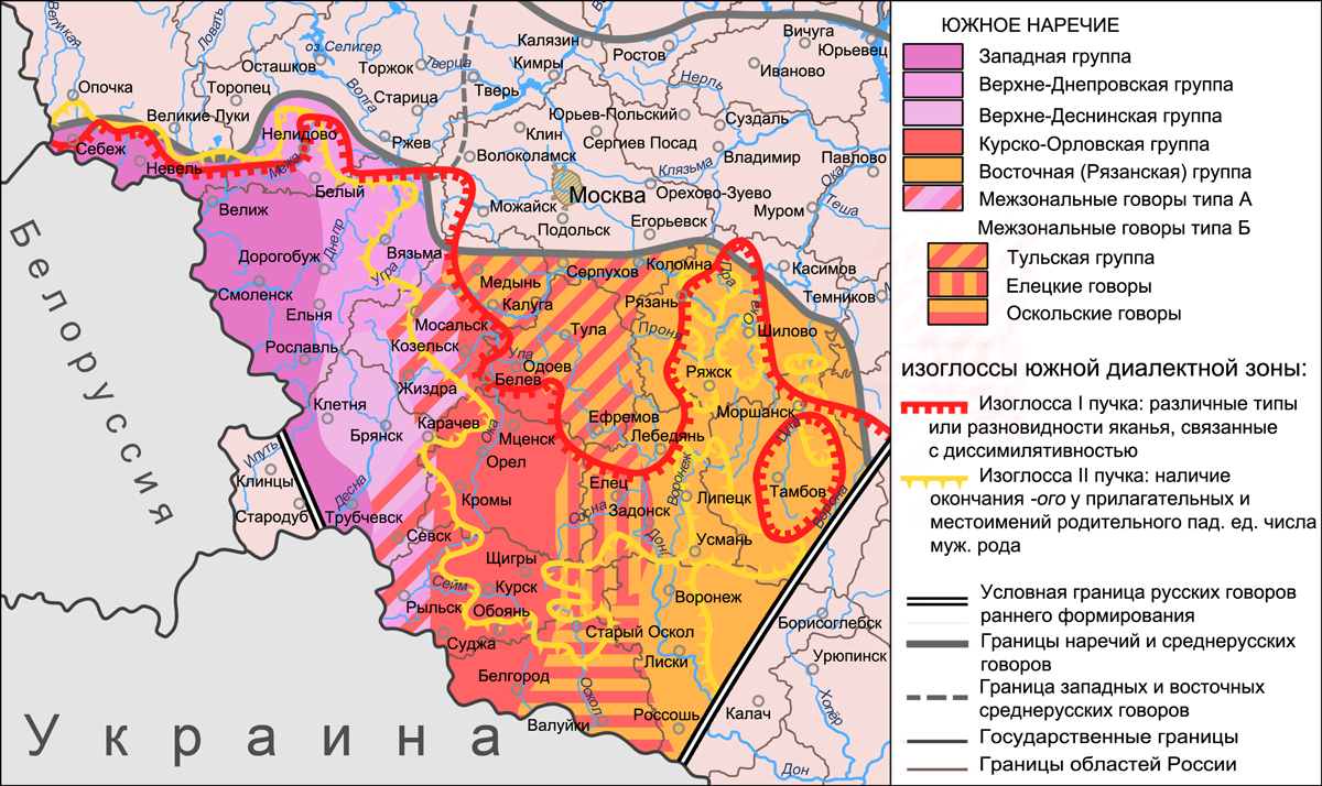 Карта южнорусских групп говоров в ареалах пучков изоглосс южной диалектной зоны. Источники: Захарова К. Ф., Орлова В. Г. Диалектное членение русского языка — 2-е изд. — М.: Едиториал УРСС, 2004. — ISBN 5-354-00917-0, приложение: Диалектологическая карта русского языка (1964 г.). Касаткин Л. Л. Русские диалекты. Лингвистическая география Русские. Монография Института этнологии и антропологии РАН — М.: Наука, 1999, с. 96. Захарова К. Ф., Орлова В. Г. Диалектное членение русского языка — 2-е изд. — М.: Едиториал УРСС, 2004. — ISBN 5-354-00917-0, с. 95. Бромлей С. В., Булатова Л. Н., Захарова К. Ф. и др. Русская диалектология / Под ред. Л. Л. Касаткина — 2-е изд., перераб. — М.: Просвещение, 1989. — ISBN 5-09-000870-1, с. 205